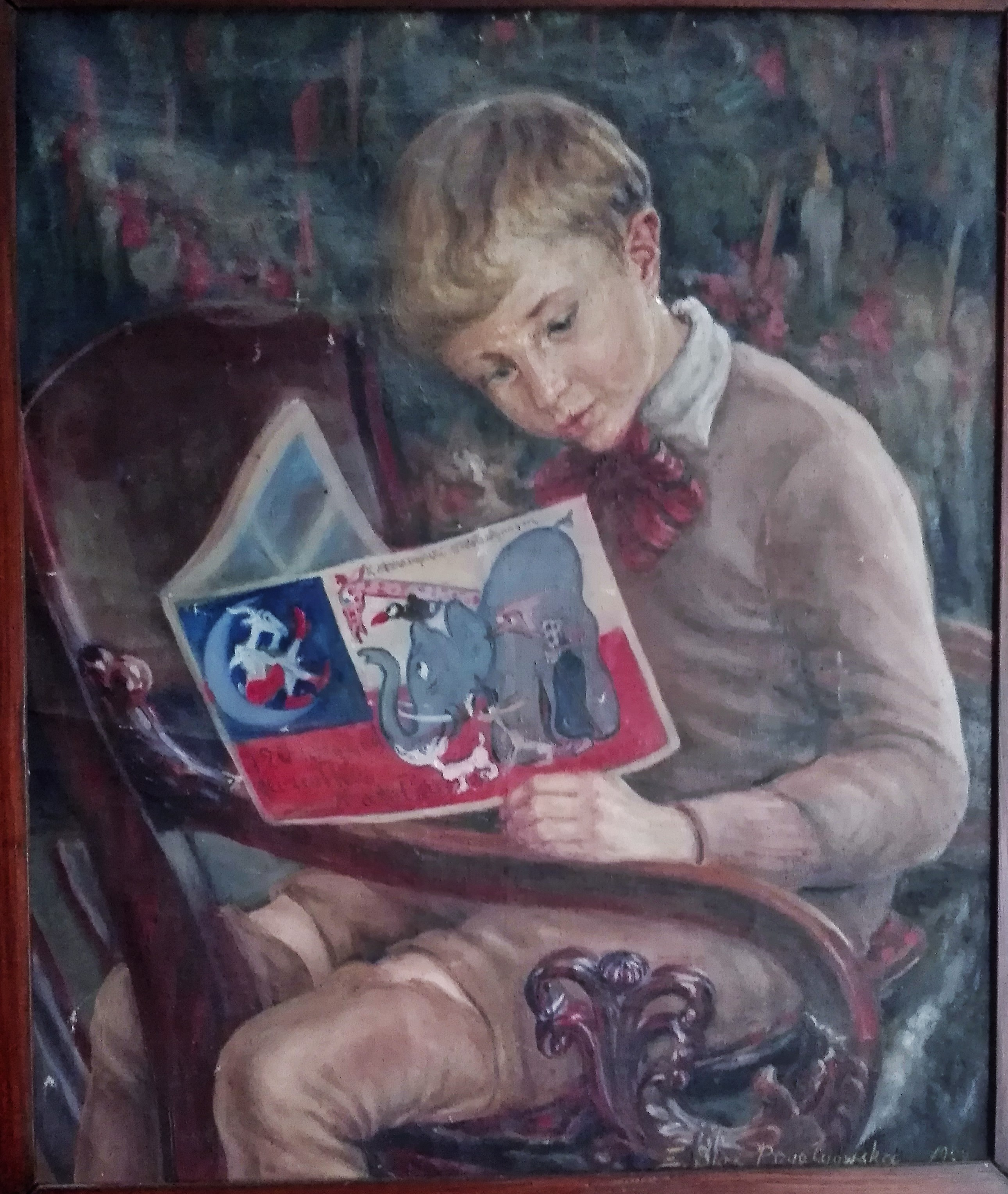 Portret bratanka, Tadeusza Sienkiewicza, okres międzywojenny.